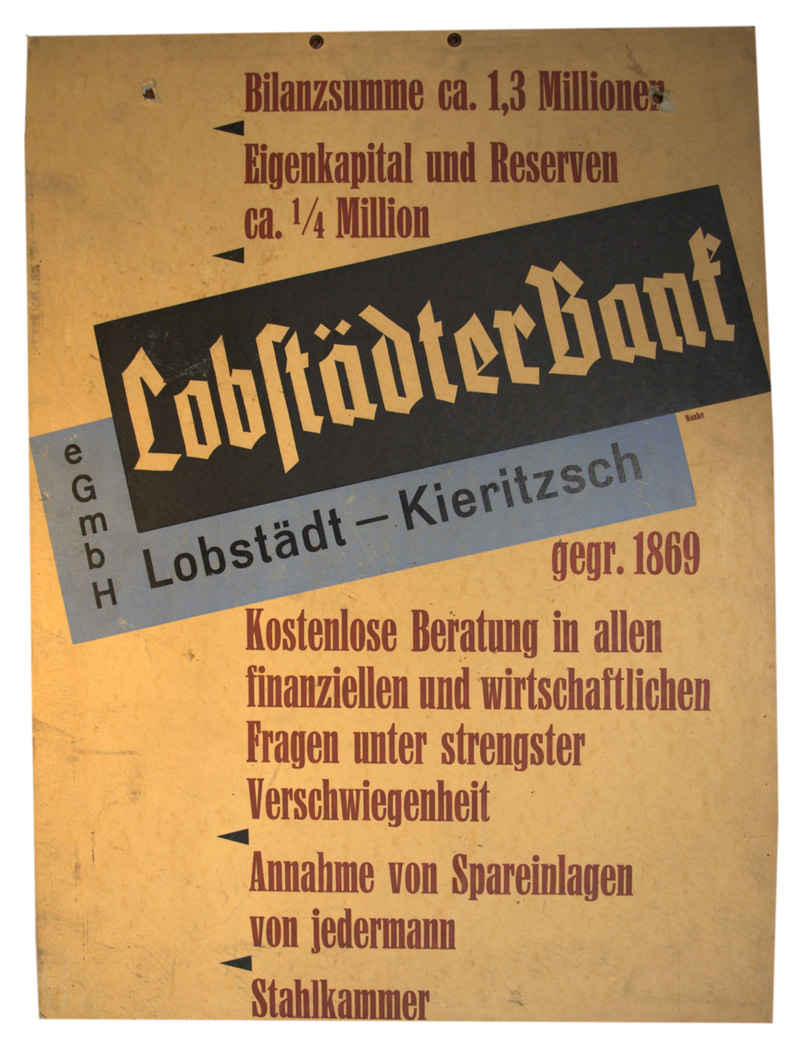 Werbetafel der Lobstädter Bank eGmbH aus dem Jahr 1940.